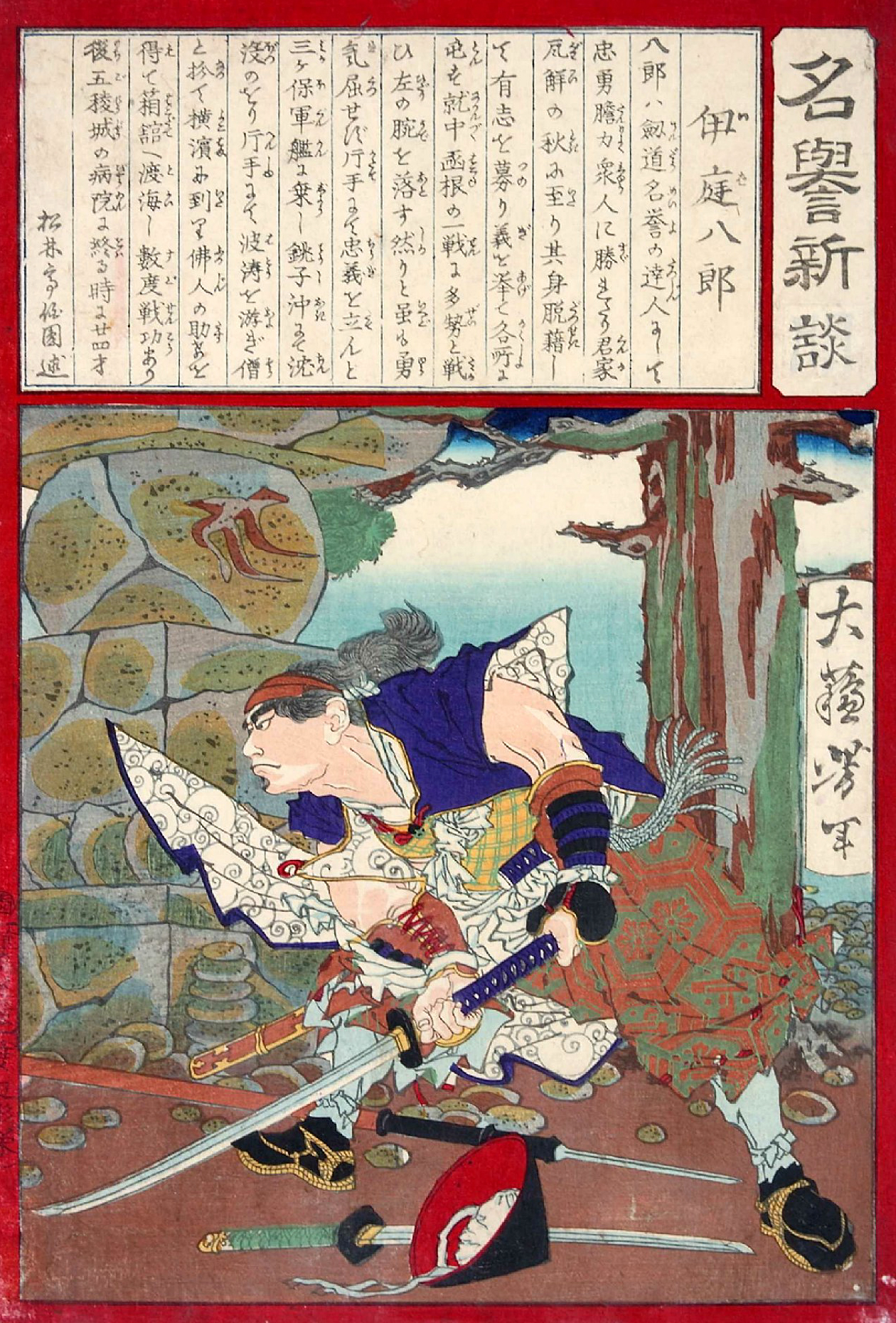 「名誉新談：伊庭八郎」 1874年